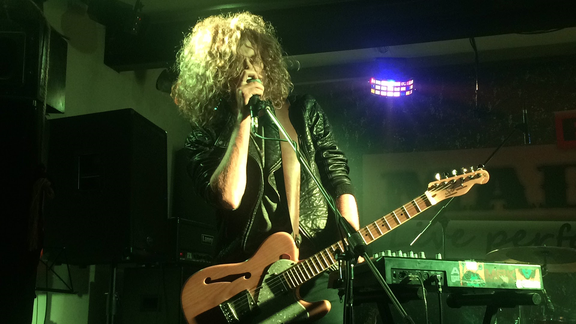 Концерт гурту Sinoptik у Кривому Розі 4 березня 2017 року.